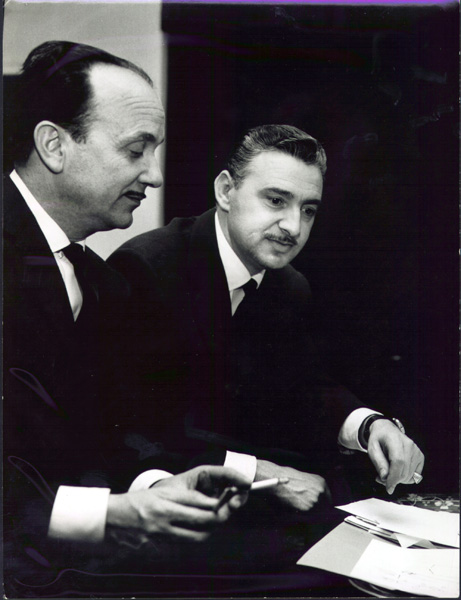 Fotografía. Jesús Vargas y Emilio Ochagavía.